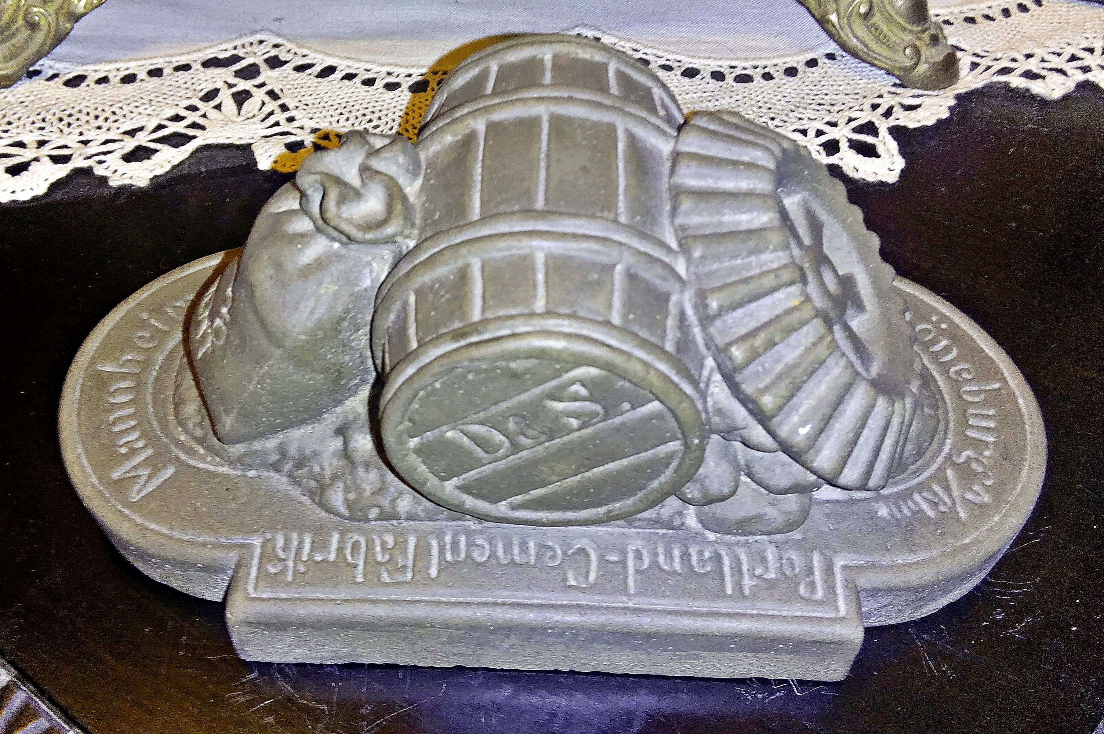 Briefbeschwerer aus Portland-Zement, Fa. Dyckerhoff und Söhne Amöneburg, um 1912